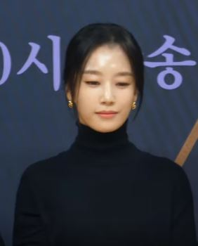 25일 오후 서울시 양천구 목동 SBS에서 새 월화드라마 'VIP'의 제작발표회가 열려 이정림 PD와 배우들이 참석해 단체 포토타임을 갖고 있다.